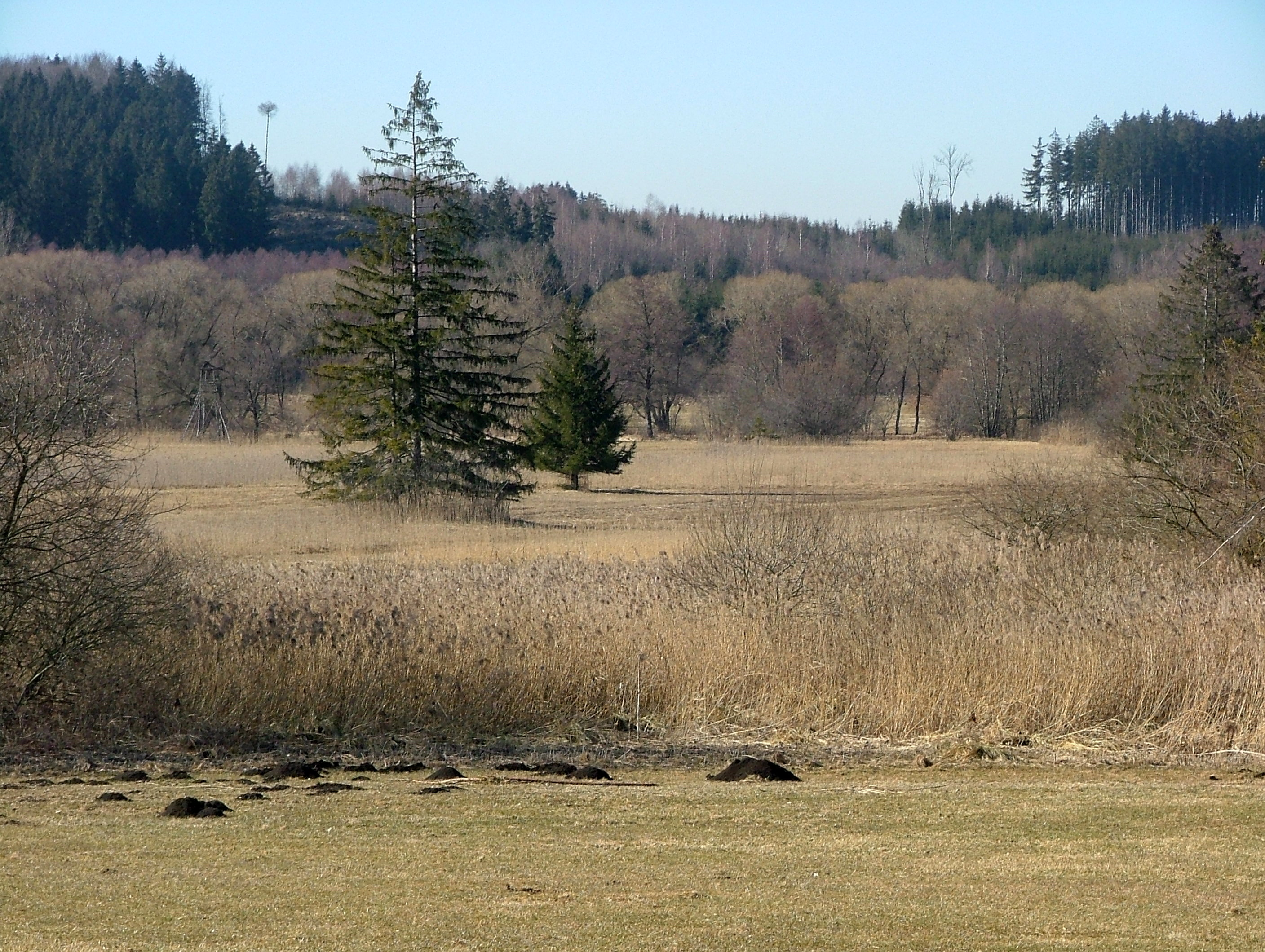 Hundsmoor bei Westerheim